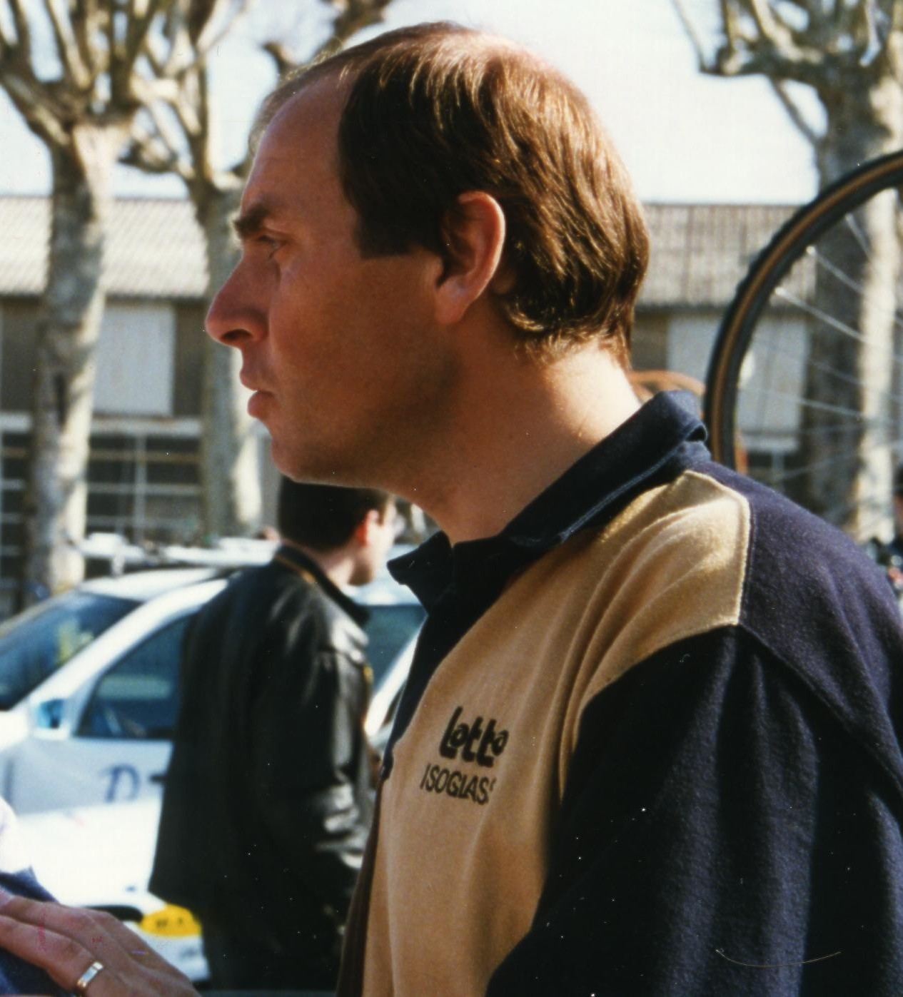 PARIS-NICE 1997